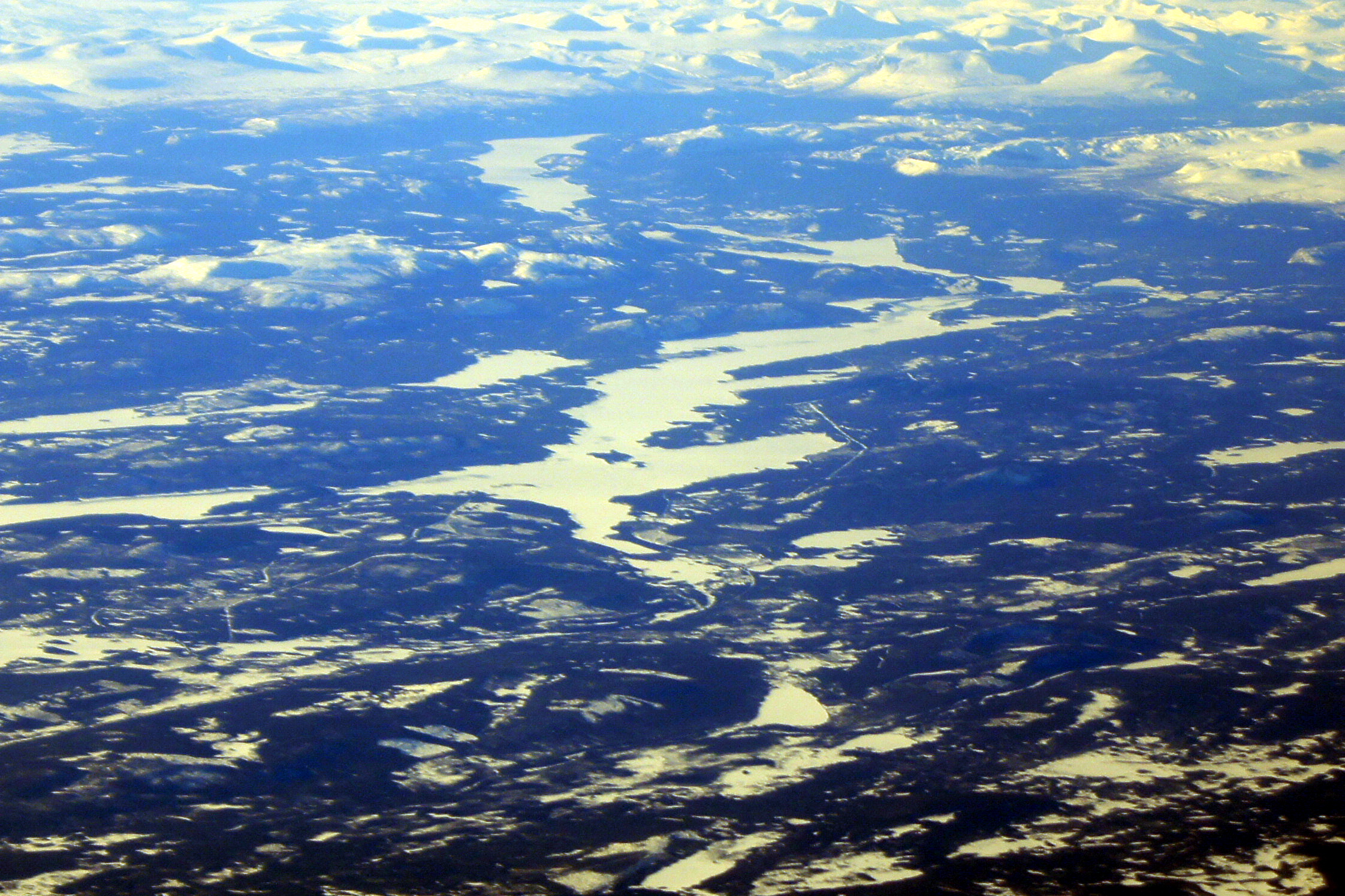 Luftbild Skalka